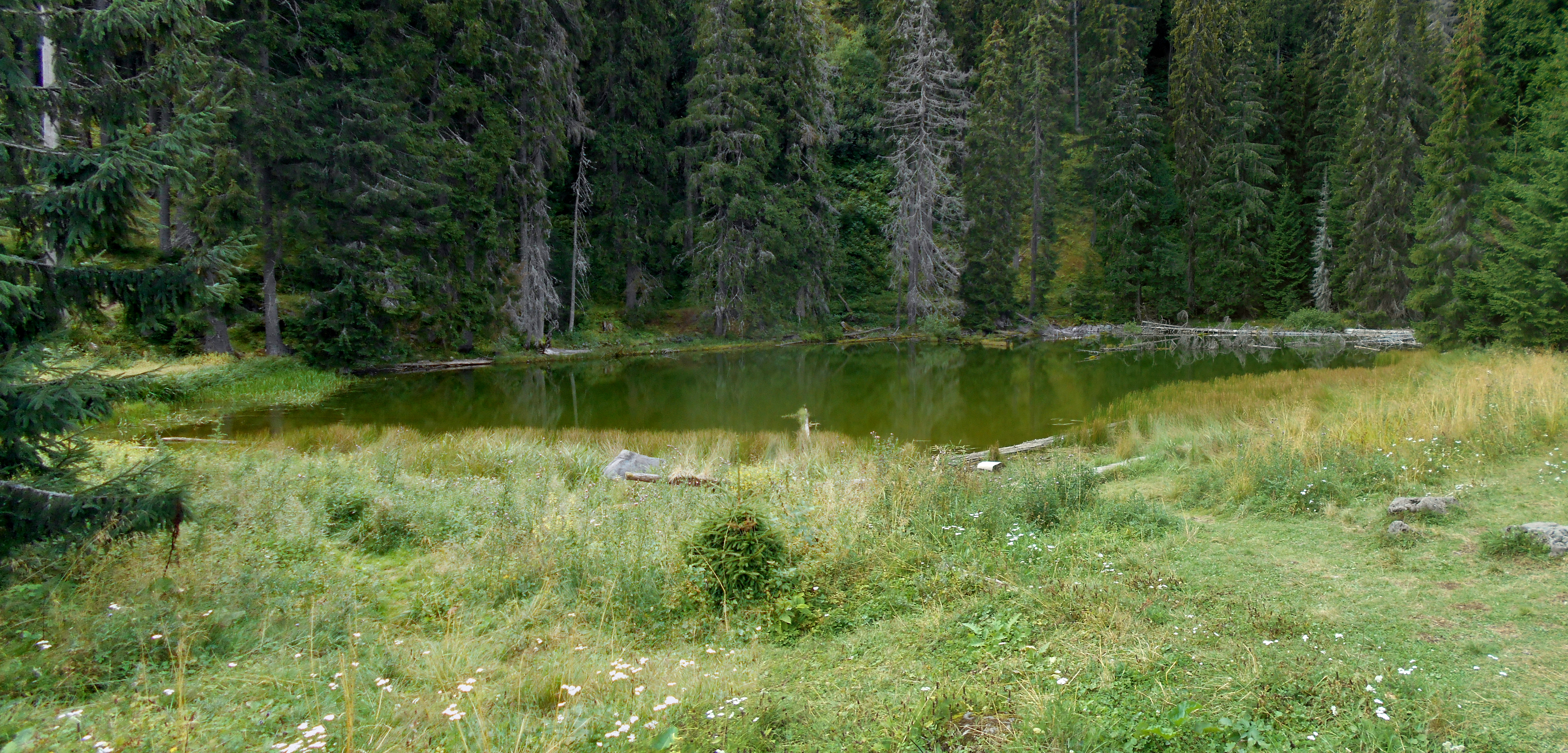 Tăul Zânelor - arie protejată de interes național ce corespunde categoriei a IV-a IUCN (rezervație naturală de tip mixt), situată în estul Transilvaniei, pe teritoriul județului Bistrița-Năsăud.